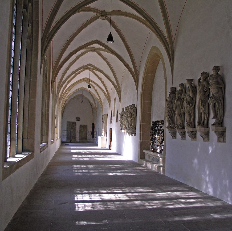 Seitliche Bearbeitung des Bildes